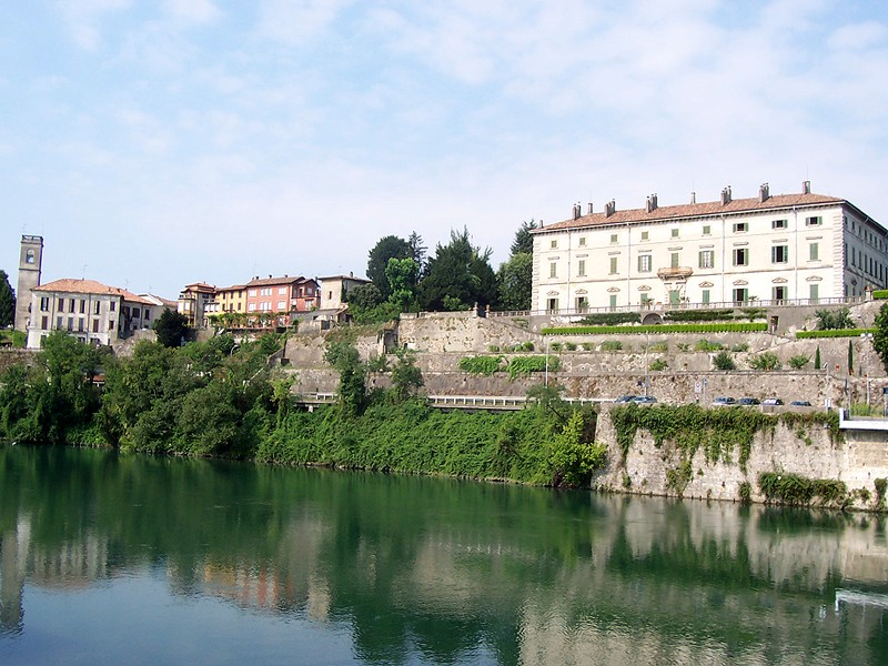 Vaprio d'Adda - Fiume Adda e Villa Melzi